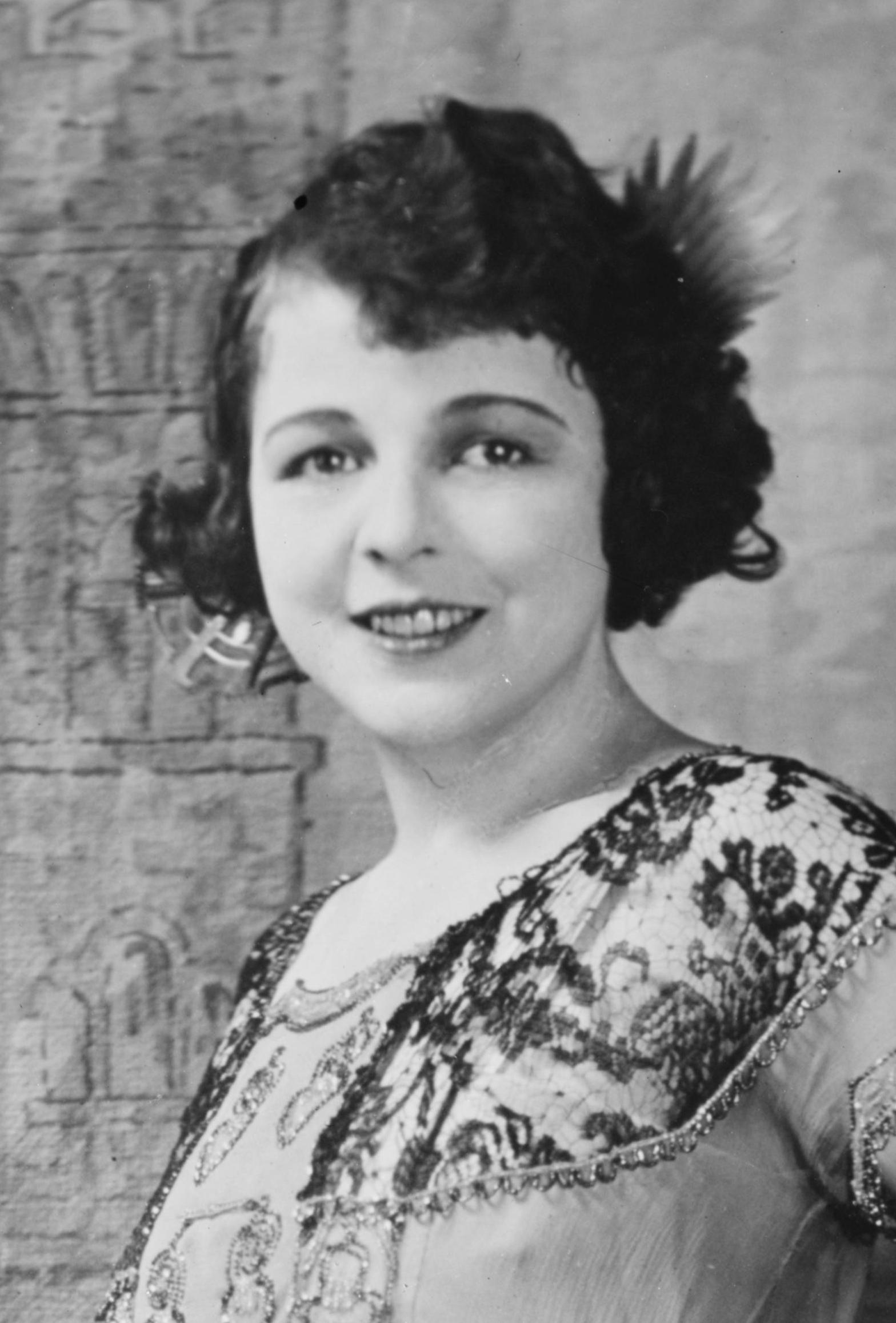 Helene Chadwick